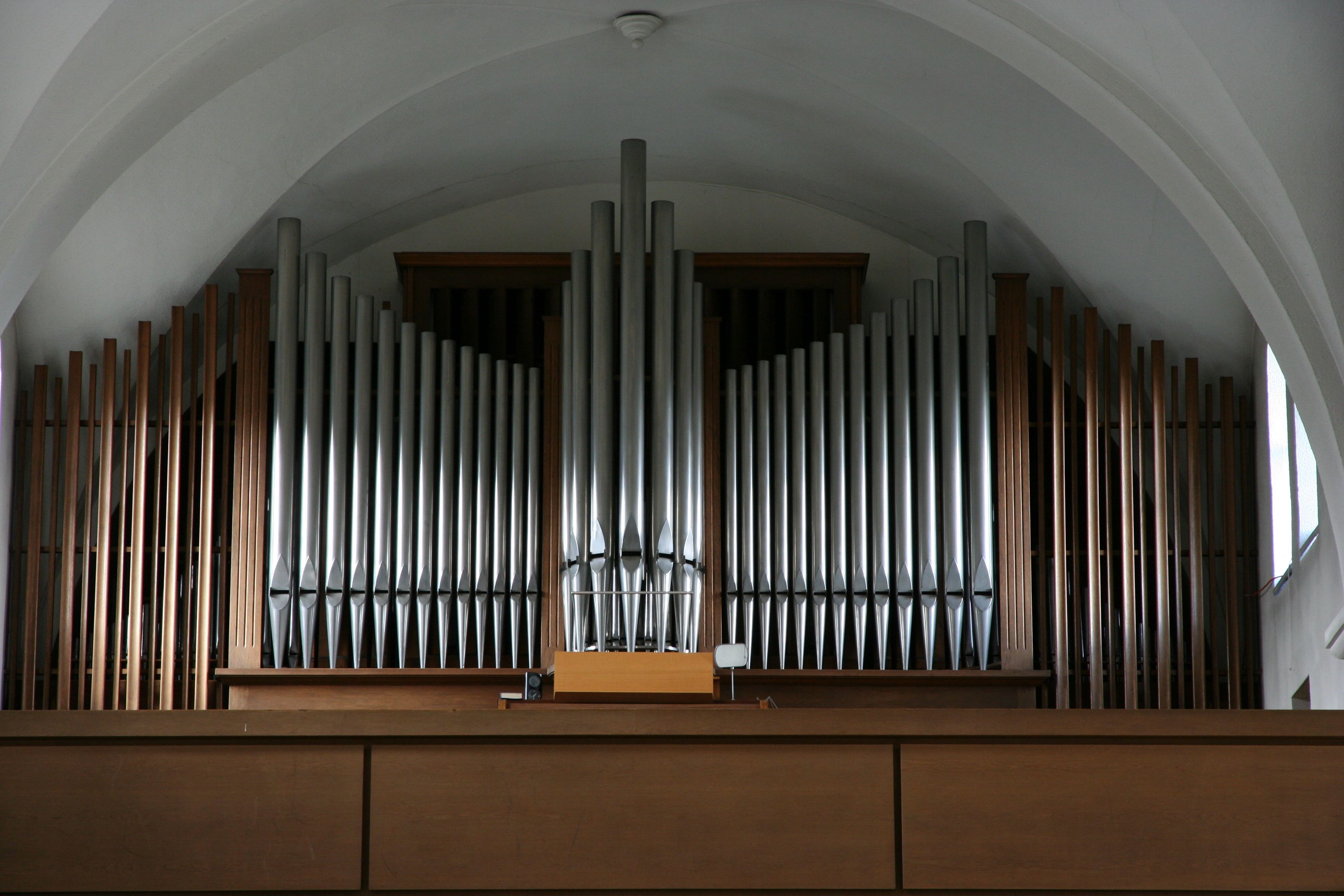 Römisch-katholische Pfarrkirche St. Marien Wädenswil, Orgel